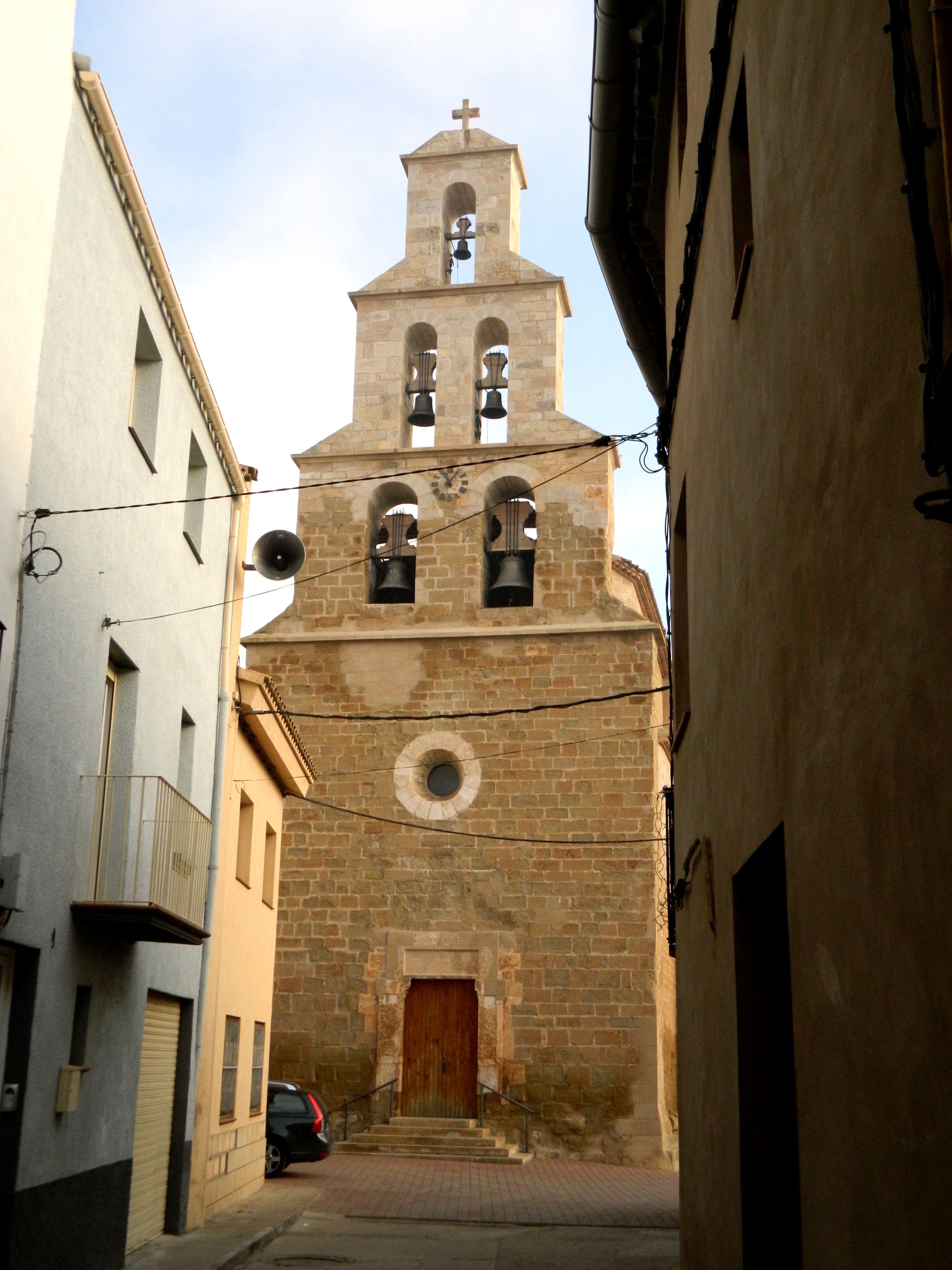 Església parroquial de l'Assumpció (Albesa)